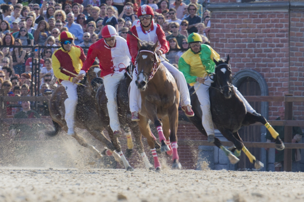 Corsa ippica del Palio di Legnano 2014